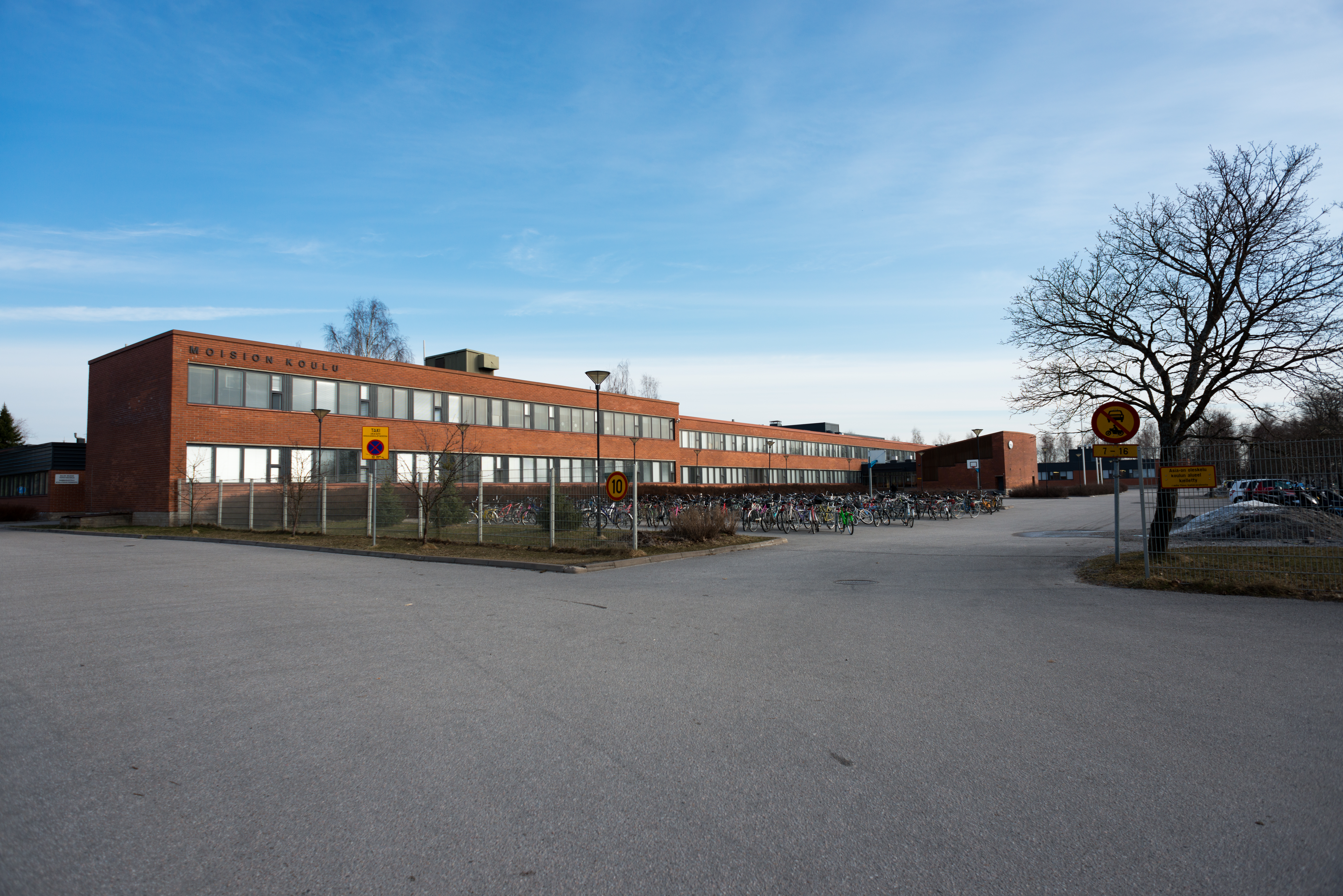 Moision koulu Salossa